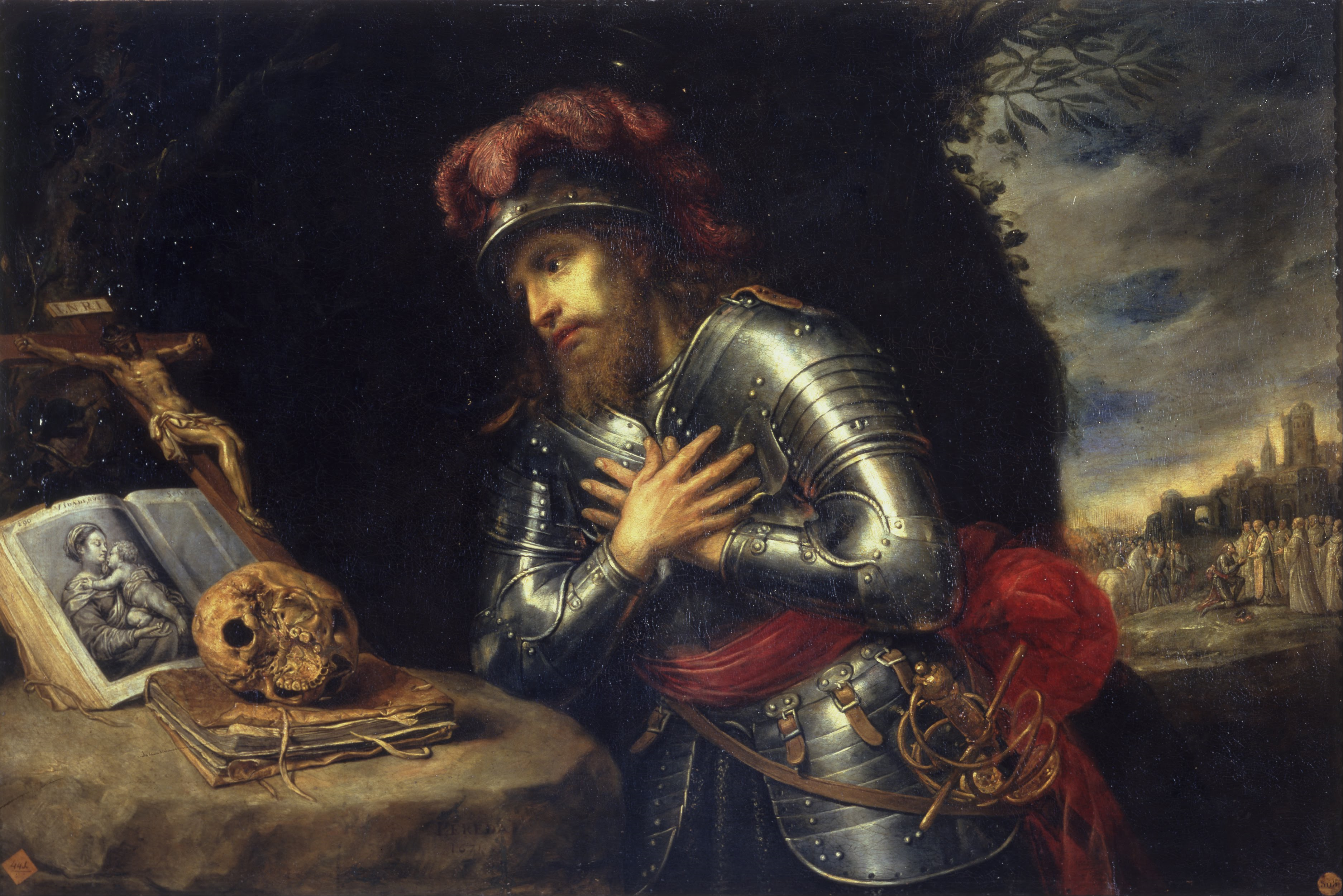 La obra representa a San Guillermo de Aquitania (755-812), que fue conde de Tolosa y es conocido también como Guillermo I el Santo o Guillermo I de Tolosa.